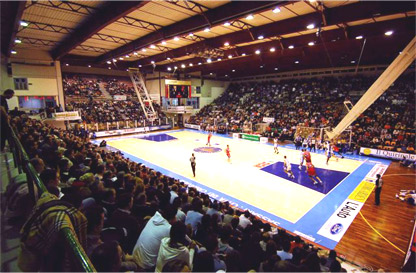 Palasport Roberta Serradimigni, Sassari , Dinamo Sassari Banco di Sardegna